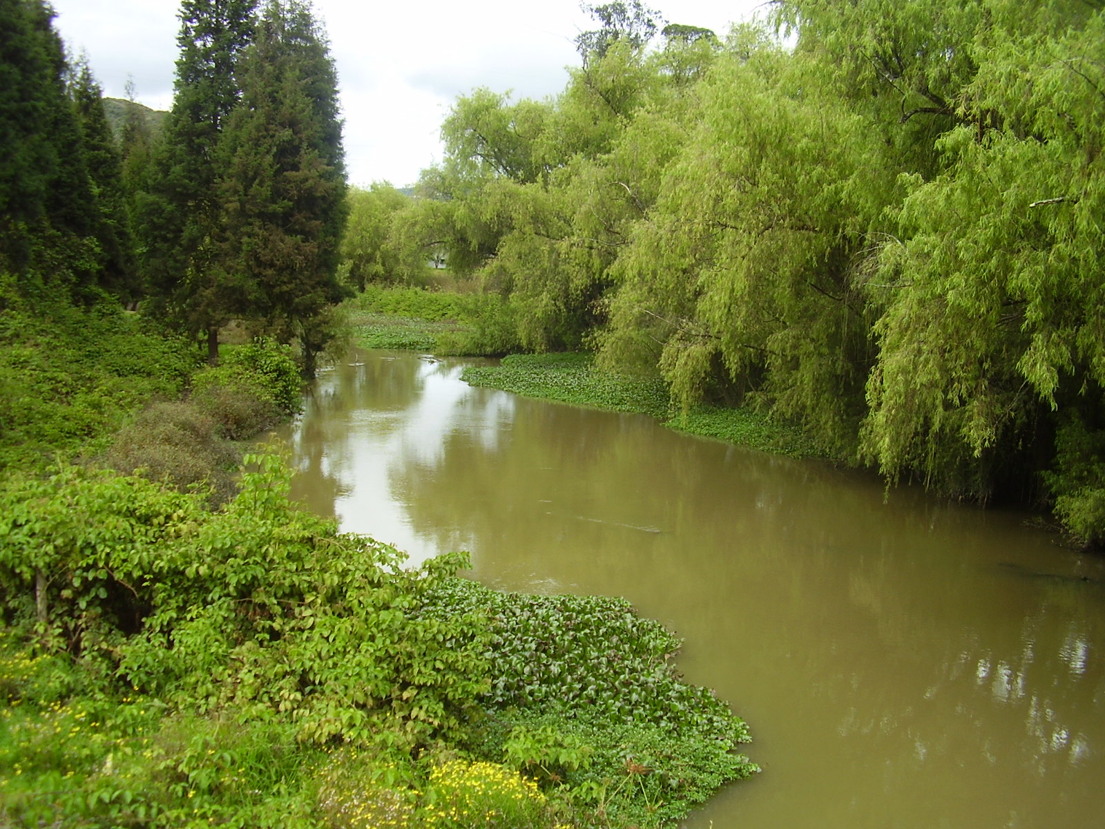 Rio Bogotá a la altura de Briceño, parque Panaca